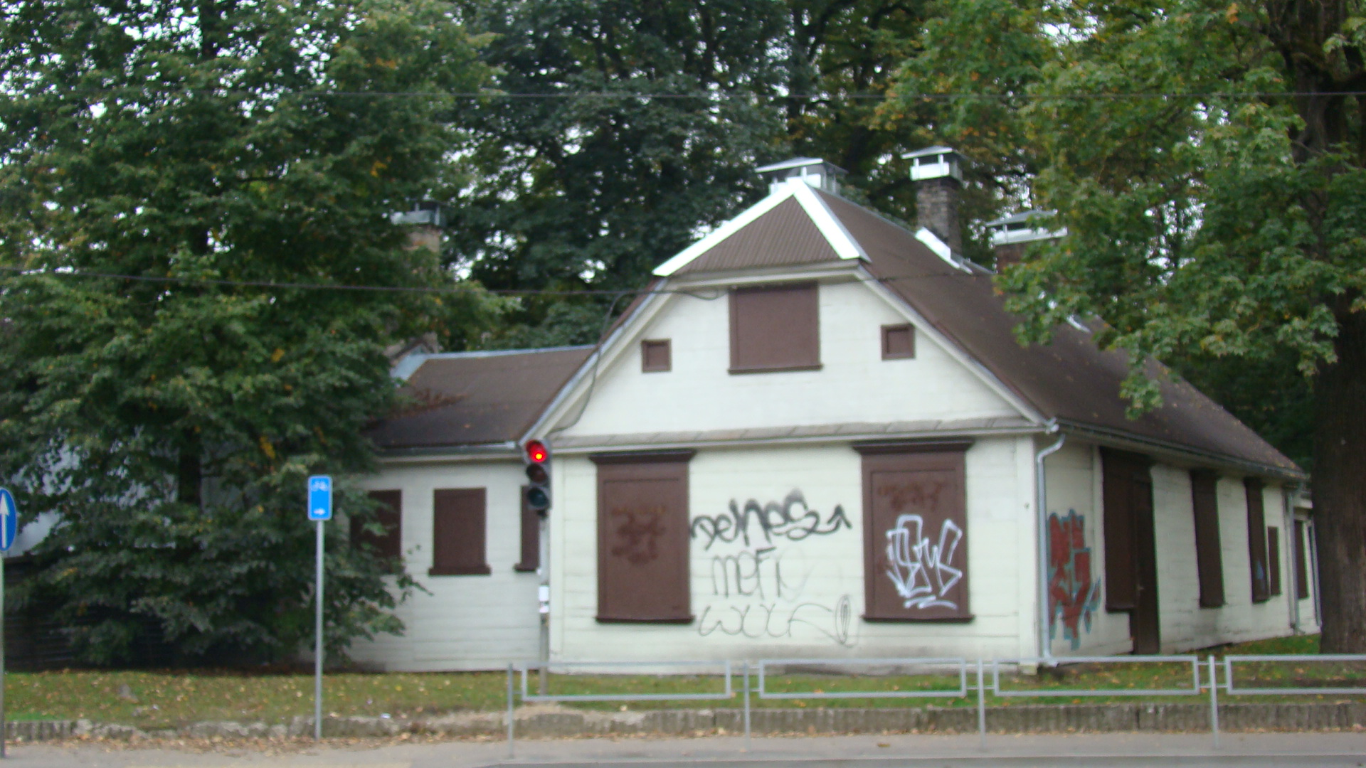 Dzīvojamā ēka, Rīga, Slokas iela 41a